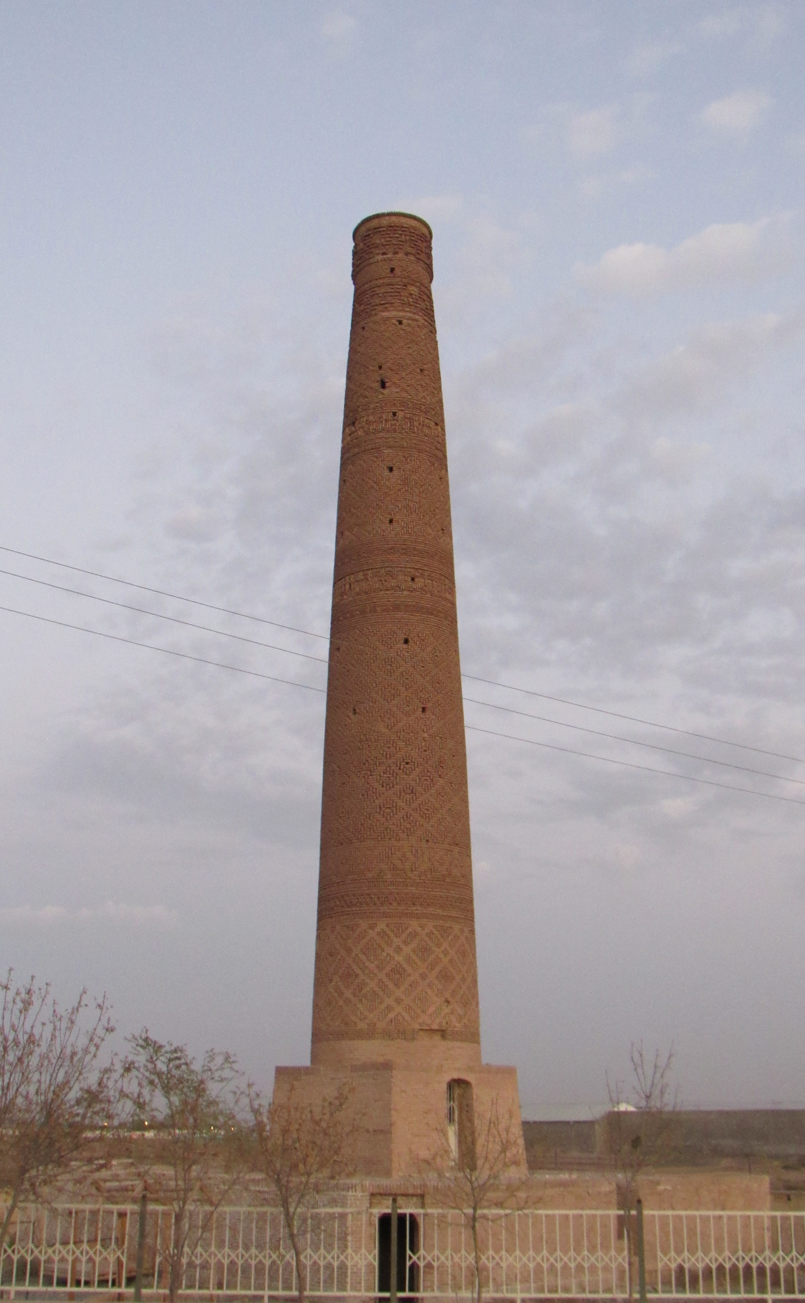 مناره خسروگرد